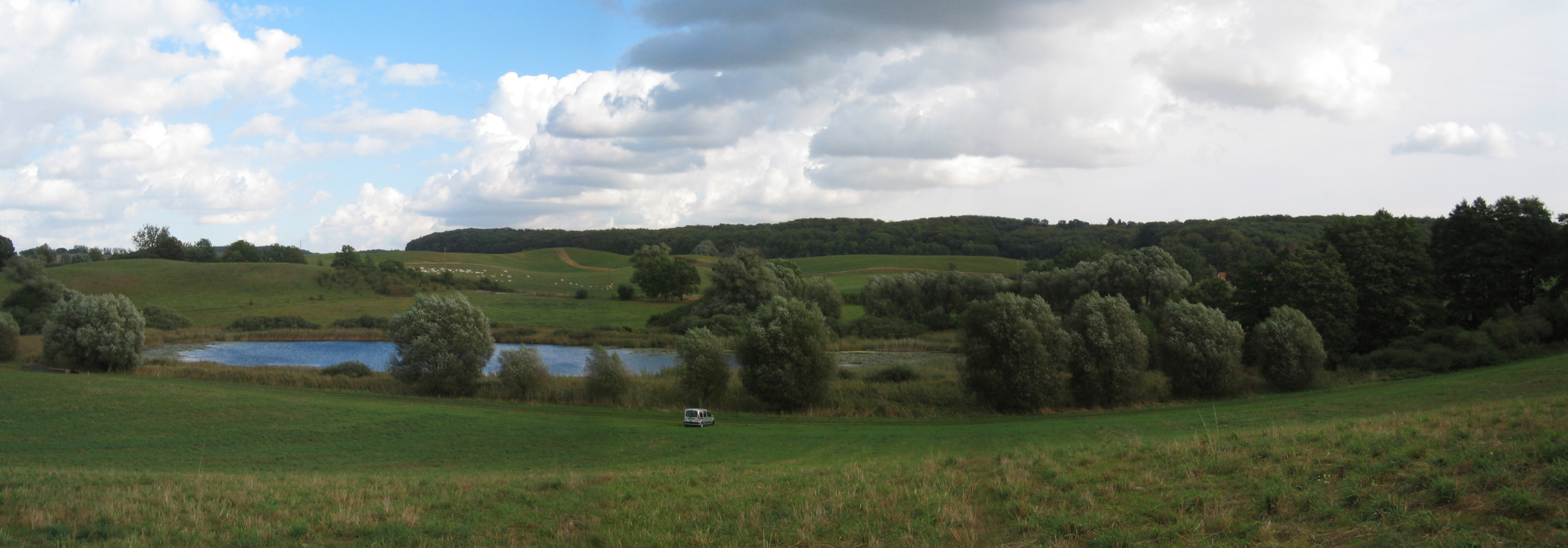 Der Kleine Triensee bei Melzow und Warnitz in der Uckermark.